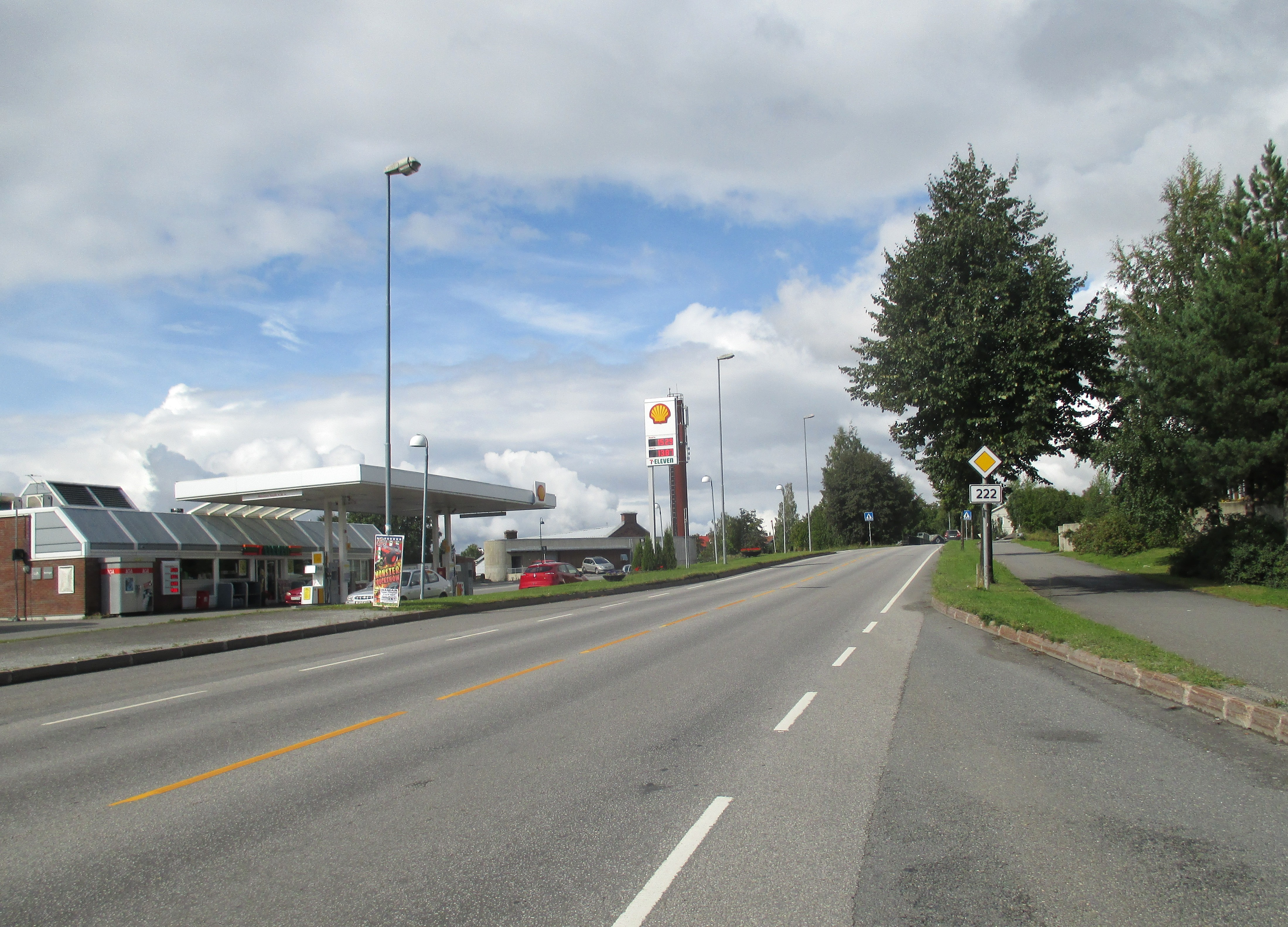 Primær fylkesvei 222 like nord for Stangebrua